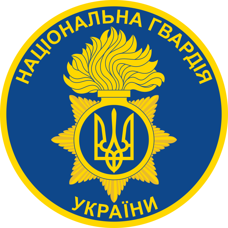 Патч НГУ з тризубом на парадну форму частин з охорони громадського порядку.